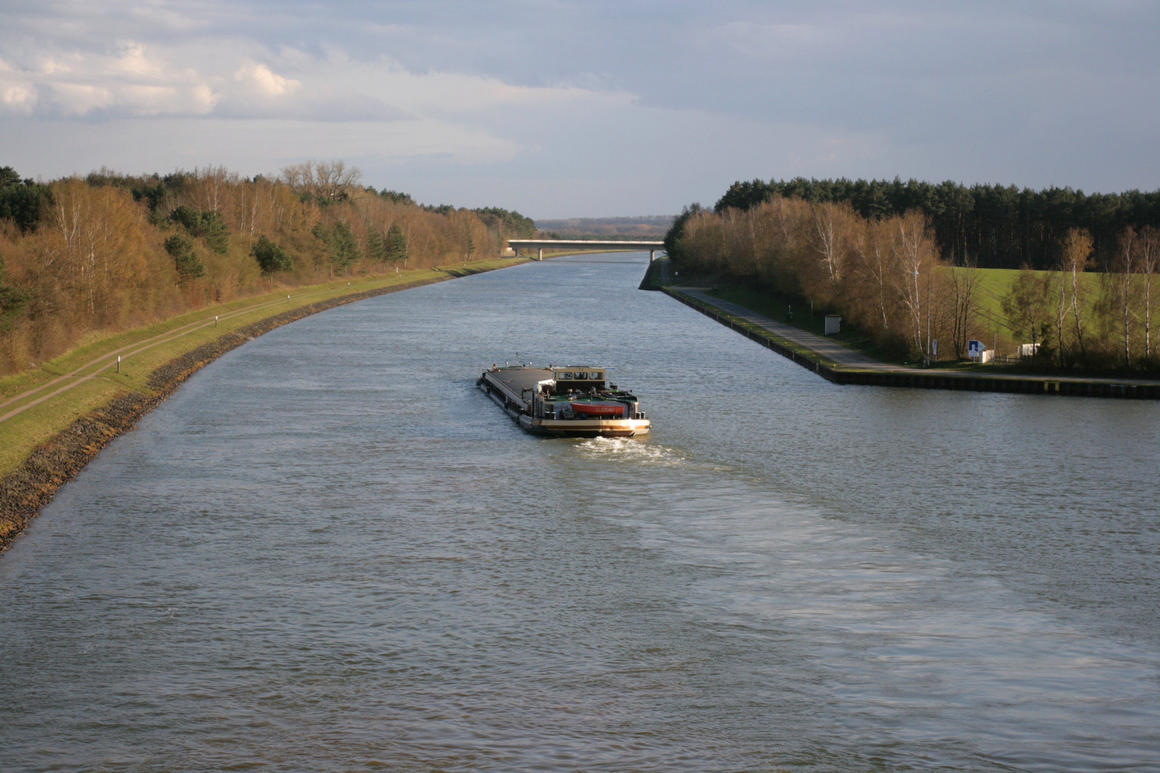 Elbe-Seitenkanal in Bad Bevensen